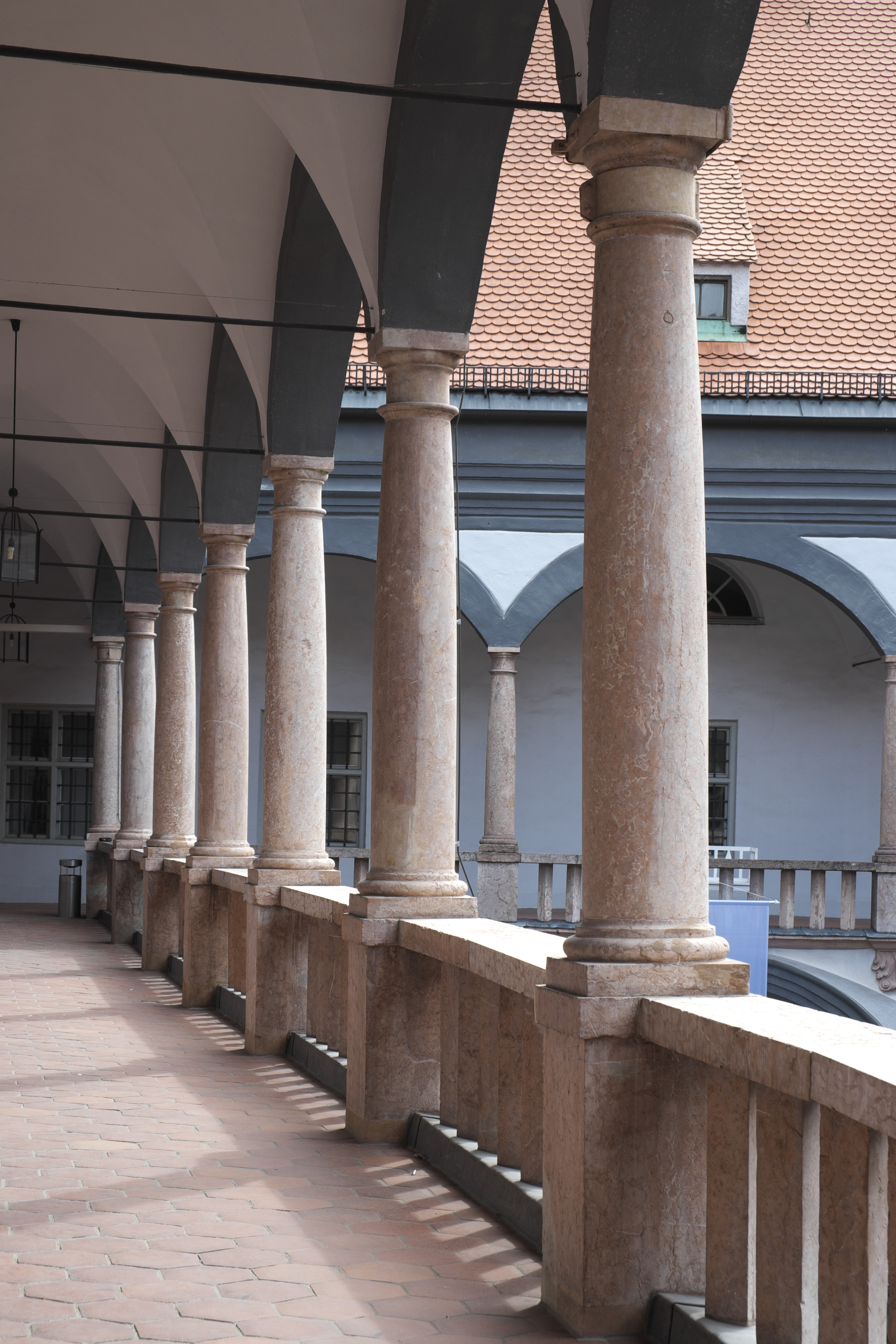 Alte Münze, heute Bayerisches Landesamt für Denkmalpflege, im Stadtteil Altstadt (München) im Stadtbezirk Altstadt-Lehel in München (Bayern/Deutschland)